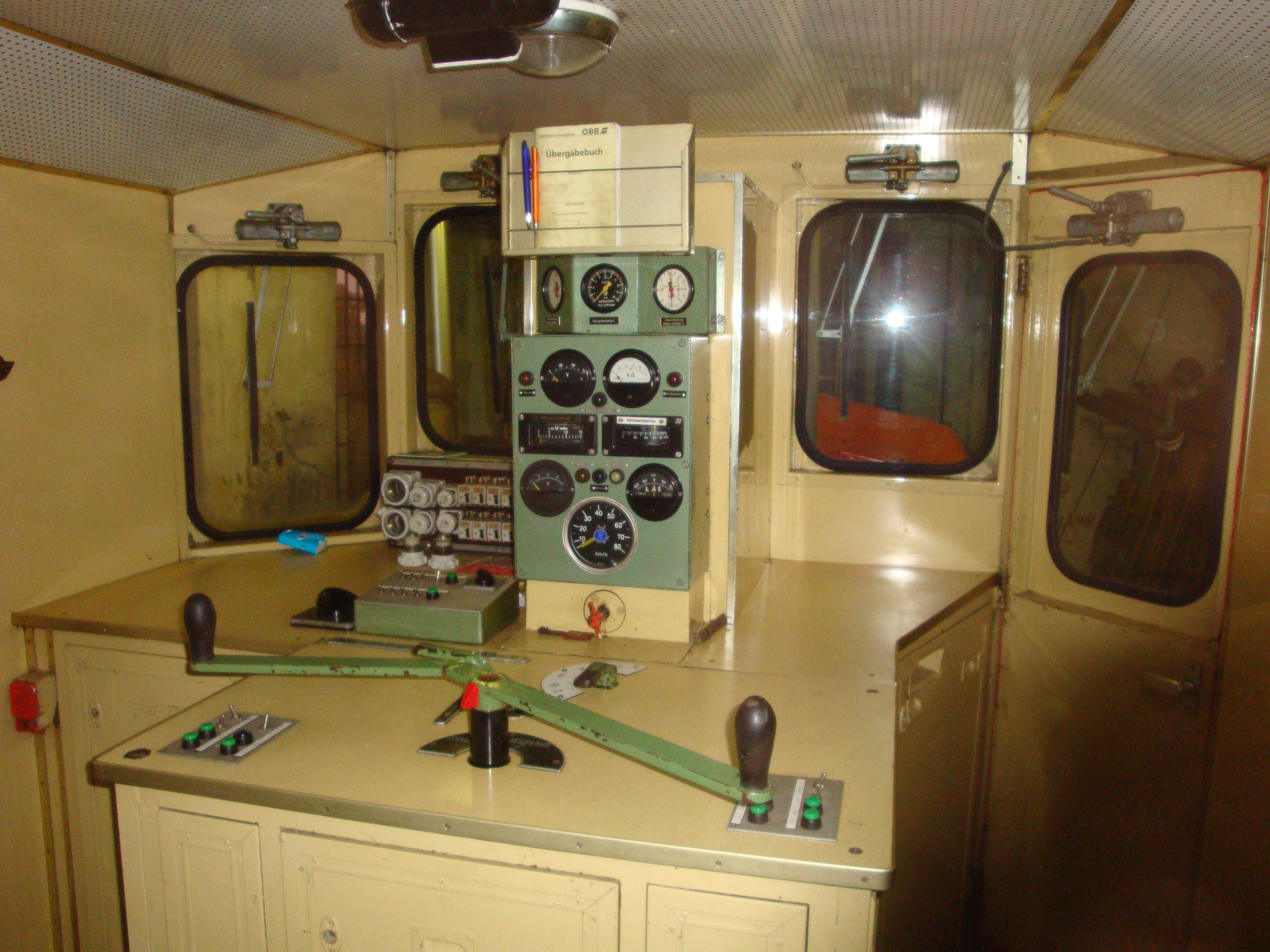 Das Foto zeigt den Führerstand der WSV 2091.09 (ex ÖBB ex NÖVOG). Die 2091.09 und 2091.11 weisen einige Änderungen zu den Schwestermaschinen auf, die den Bedienkomfort für den Lokführer erhöhen sollten.